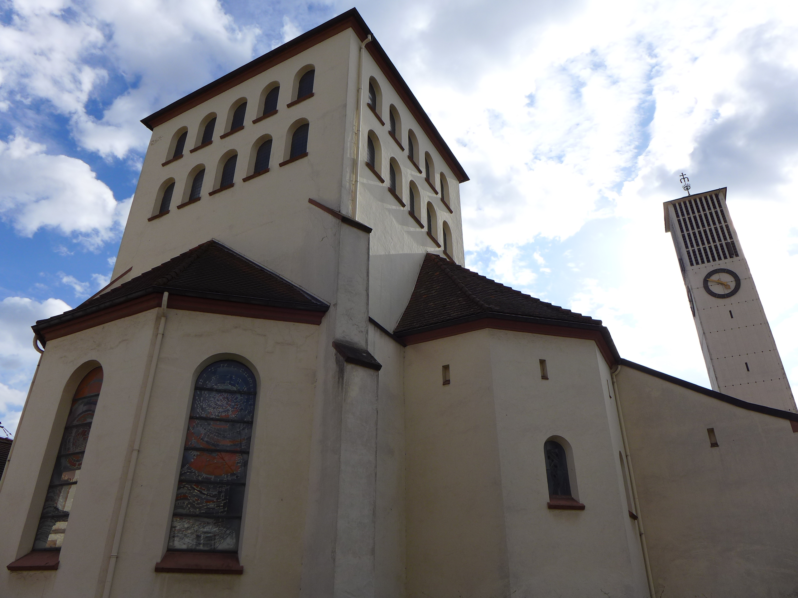 Hl. Dreifaltigkeit (Fraulautern) Gute Bilder Erweitert ... Hl. Dreifaltigkeit (Fraulautern) Gute Bilder Erweitert ... Fraulautern, Kirche "Heiligste Dreifaltigkeit", Apsis